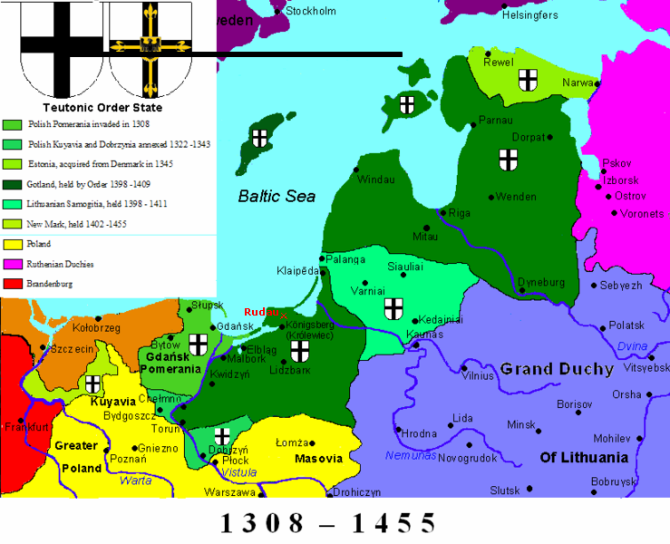 History map of Ordenstaat 1308-1455 incl. Lokalisation Rudau